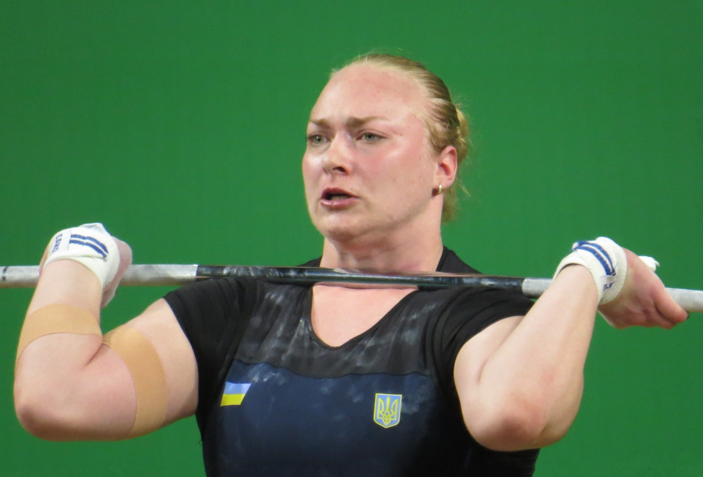 Anastasiya Lysenko, Rio Olympics